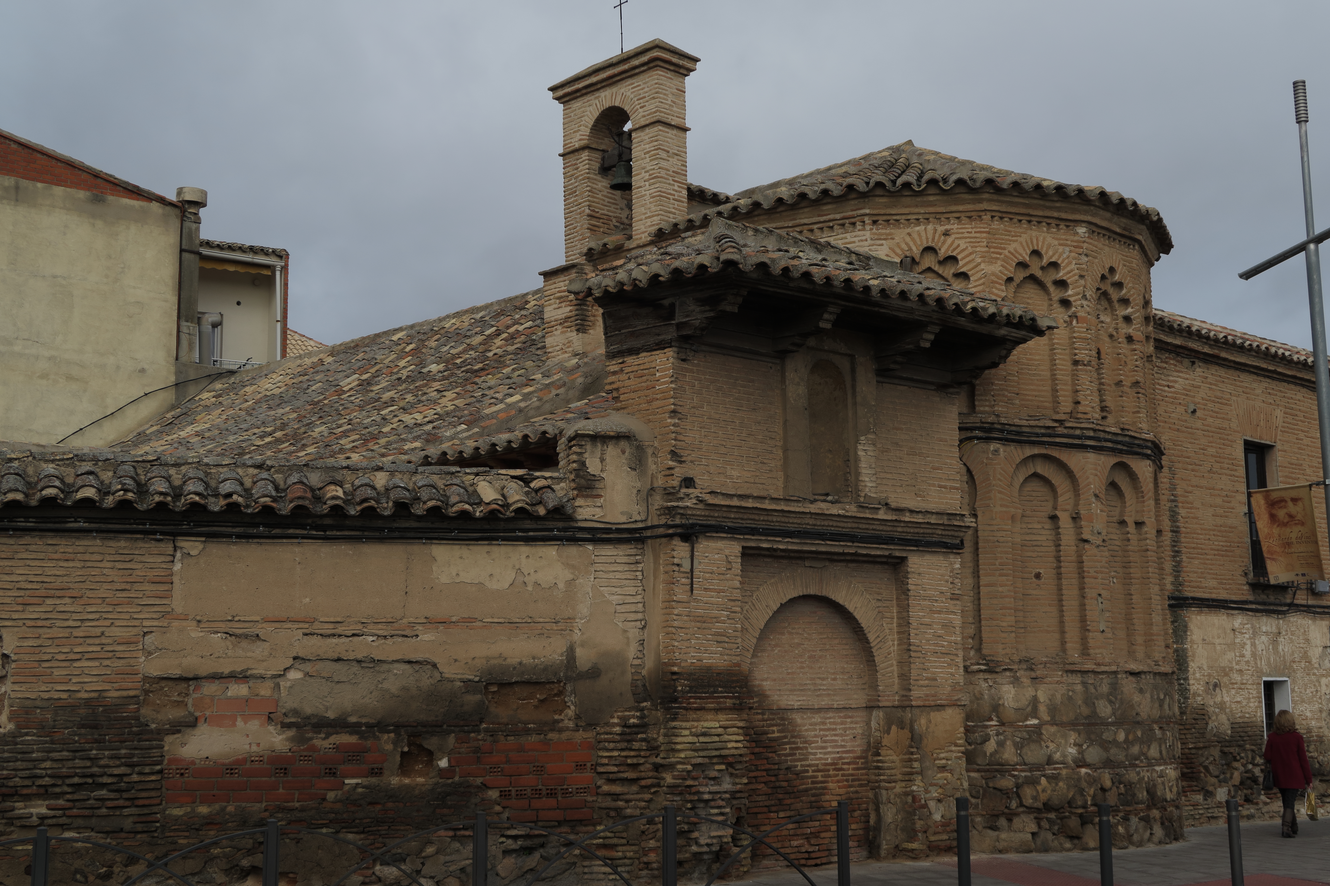 Fachada Ermita de San Eugenio, Toledo